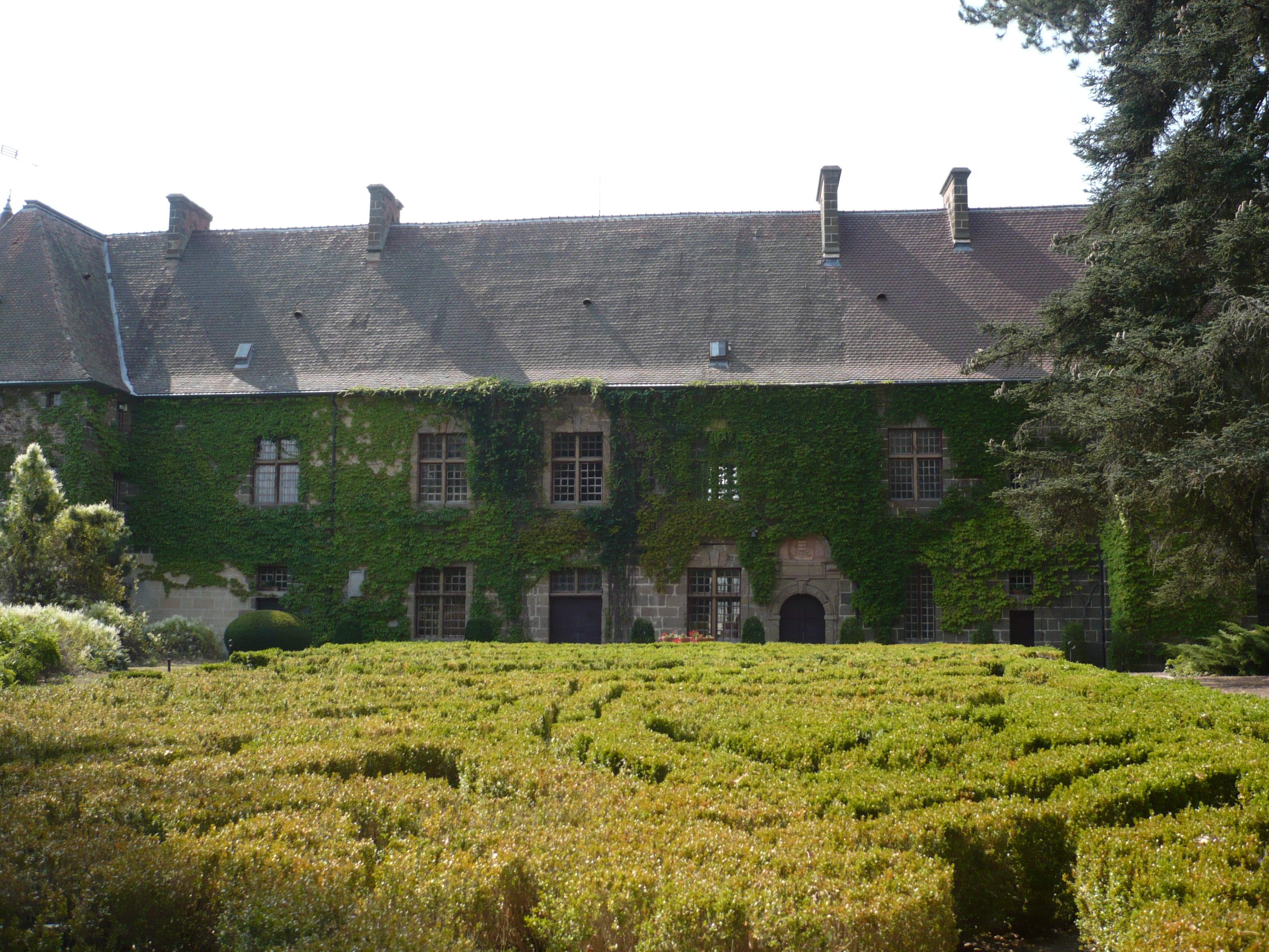 Château de Lavoûte-Polignac